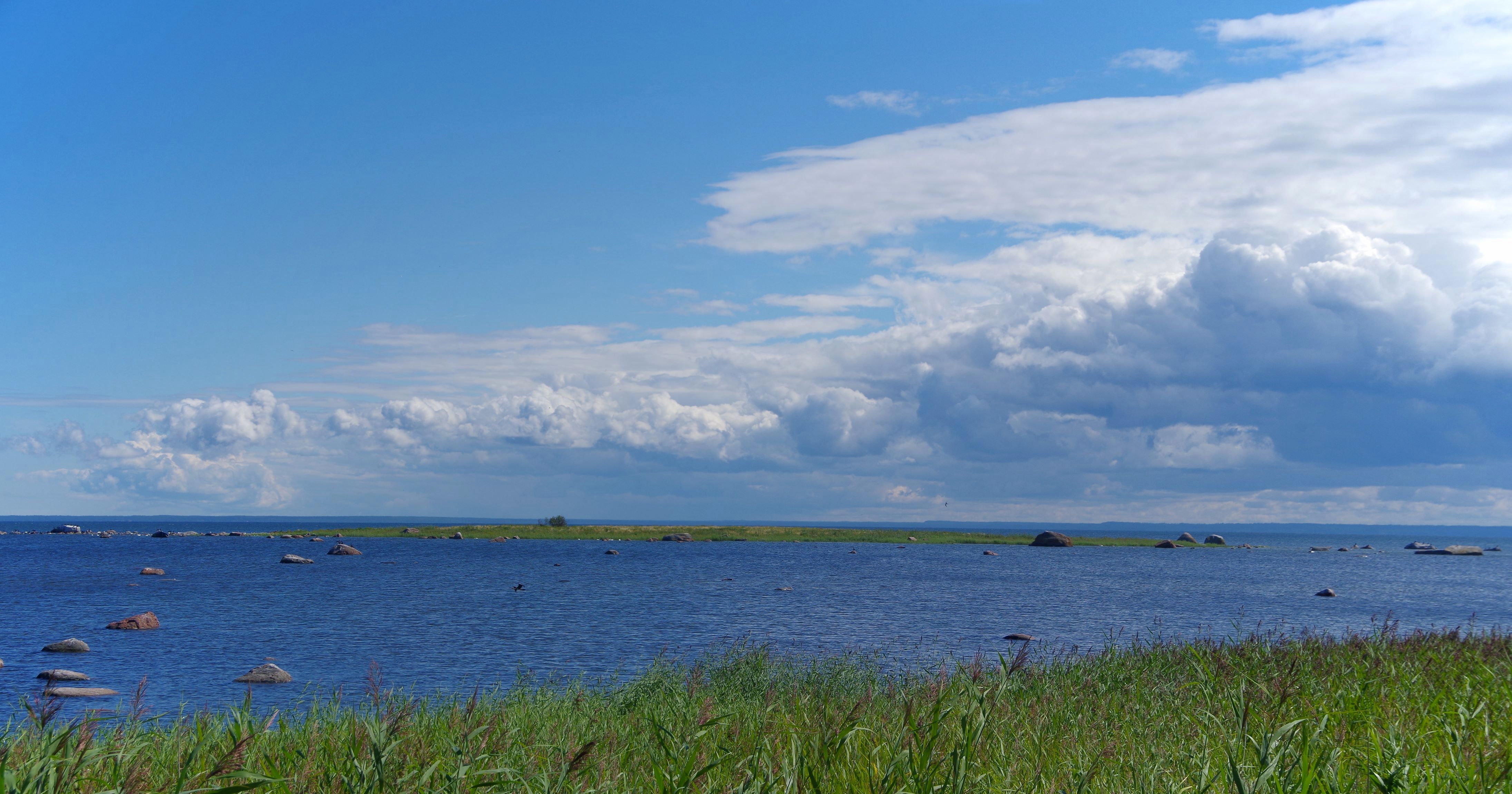 Rammu saar on Harjumaal Jõelähtme vallas asuv 1,0256 km² suurune väikesaar.